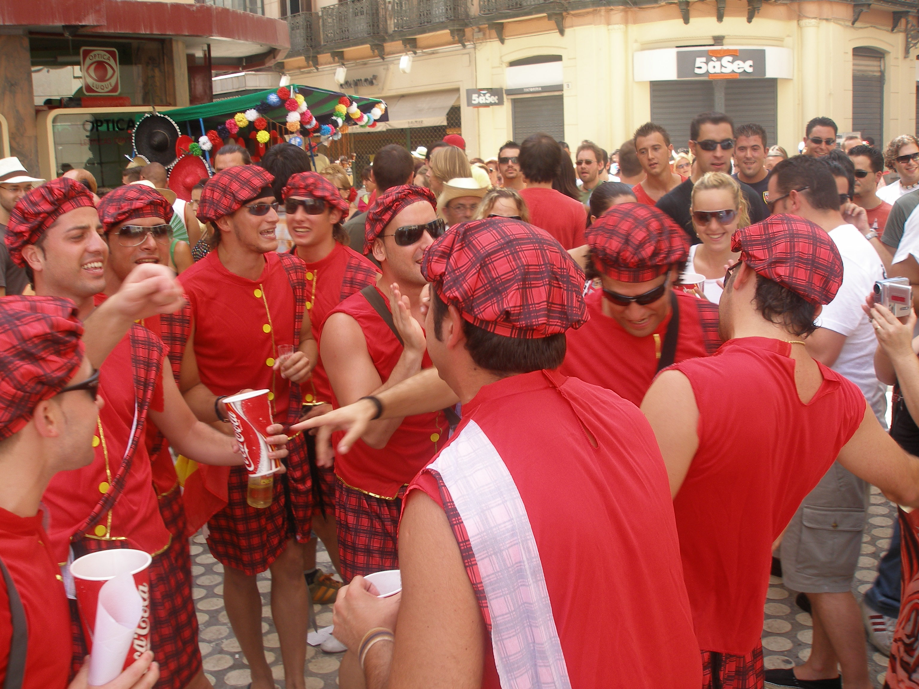 Grupo de personas en la edición 2006 de la Feria de Agosto, Málaga, Spain.